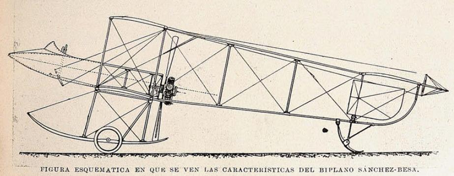 Figura esquemática en que se ven las características del Biplano de Sánchez-Besa.